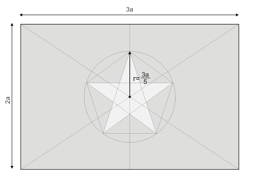 Chi tiết tỉ lệ các kích thước trong Quốc kỳ Việt Nam. Thông tư số 68/VHTT-TT ngày 24 tháng 8 năm 1993 của Bộ Văn hóa, Thông tin (nay là Bộ Văn hóa, Thể thao và Du lịch): Quốc kỳ nước Cộng hòa xã hội chủ nghĩa Việt Nam hình chữ nhật, chiều rộng bằng hai phần ba chiều dài, nền đỏ, ở giữa có ngôi sao vàng năm cánh. Điểm giữa ngôi sao vàng đặt đúng điểm giữa (điểm giao nhau của hai đường chéo) Quốc kỳ. Khoảng cách từ điểm giữa ngôi sao đến đầu cánh sao bằng một phần năm chiều dài của Quốc kỳ. Một cánh sao có trục vuông góc với cạnh dài Quốc kỳ và hướng thẳng lên phía trên theo đầu cột treo Quốc kỳ. Tạo hình ngôi sao: từ đầu cánh sao này đến đầu cánh sao đối diện là đường thẳng, không phình ở giữa, cánh sao không bầu. Hai mặt của Quốc kỳ đều có ngôi sao vàng trùng khít nhau. Nền Quốc kỳ màu đỏ tươi, ngôi sao màu vàng tươi.